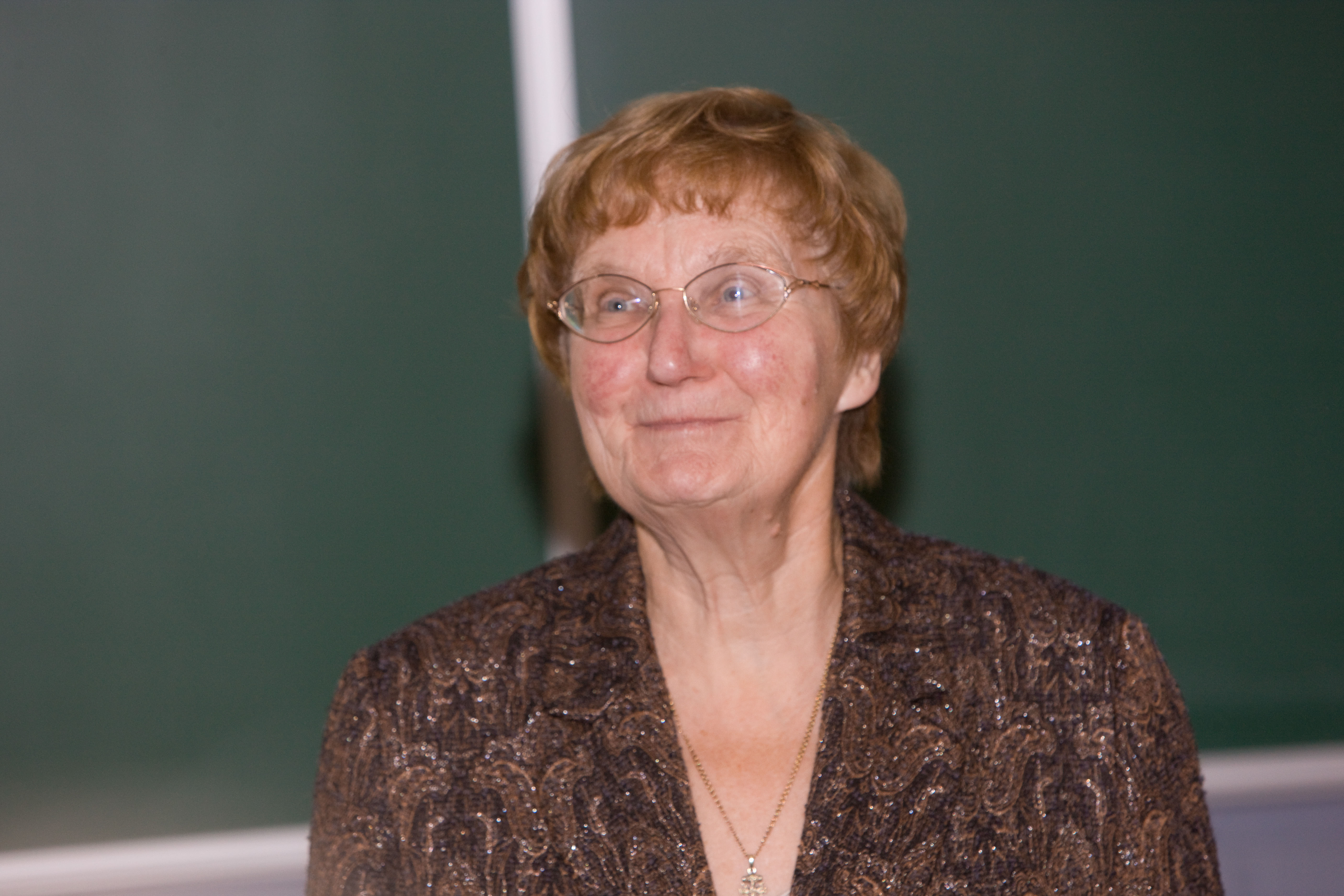 Ene-Margit Tiit konverentsil "Pool sajandit arvutit Tartu Ülikoolis" J. Liivi 2 õppehoones.